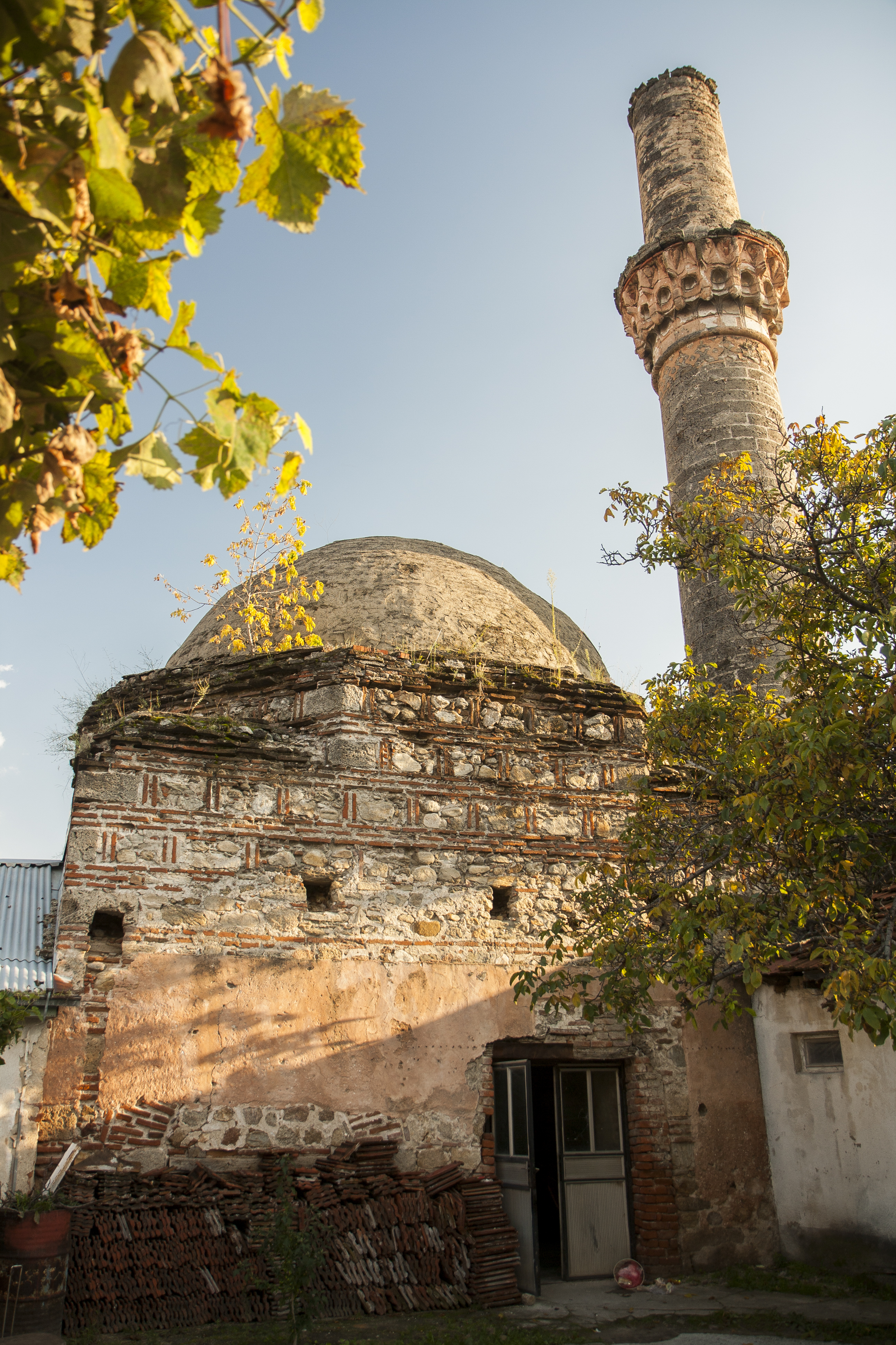 “Скршена“ џамија, ул. “Андон Слабејко бр. 35/а